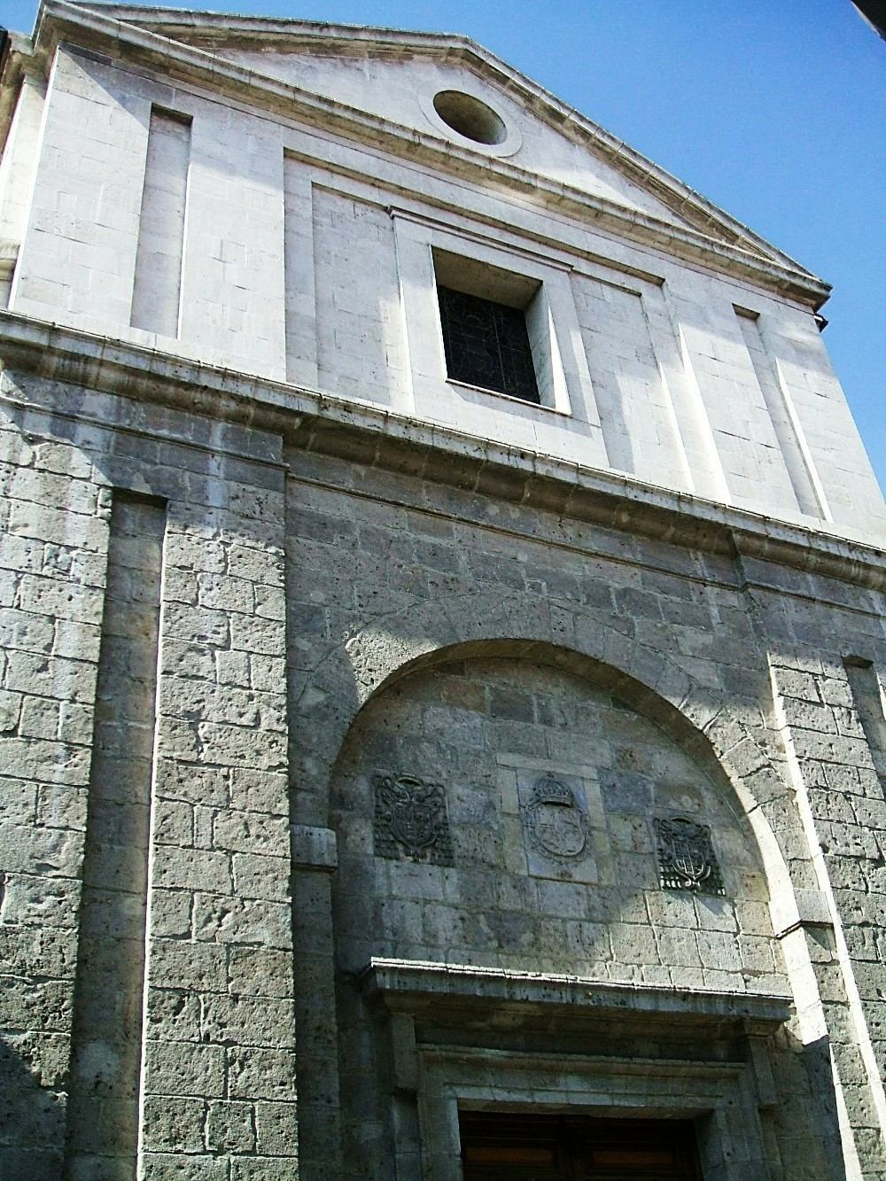 Basílica Menor y Santuario Nacional de la Gran Promesa, en Valladolid, España/Spain